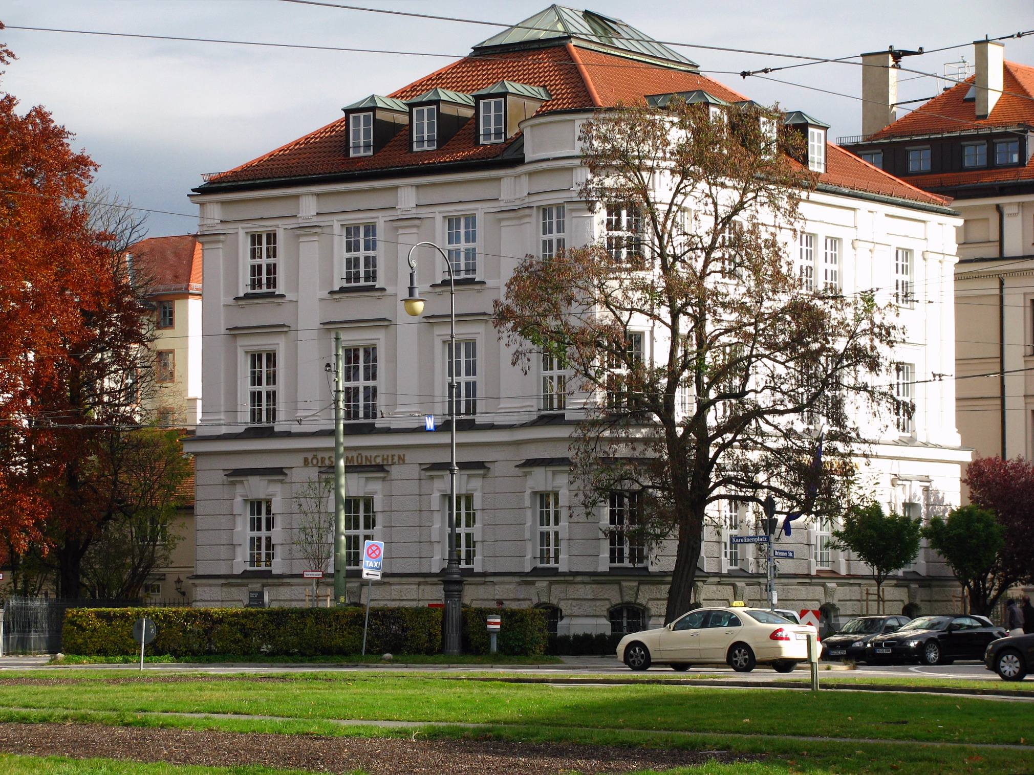 Das Gebäude der Börse München am Karolinenplatz